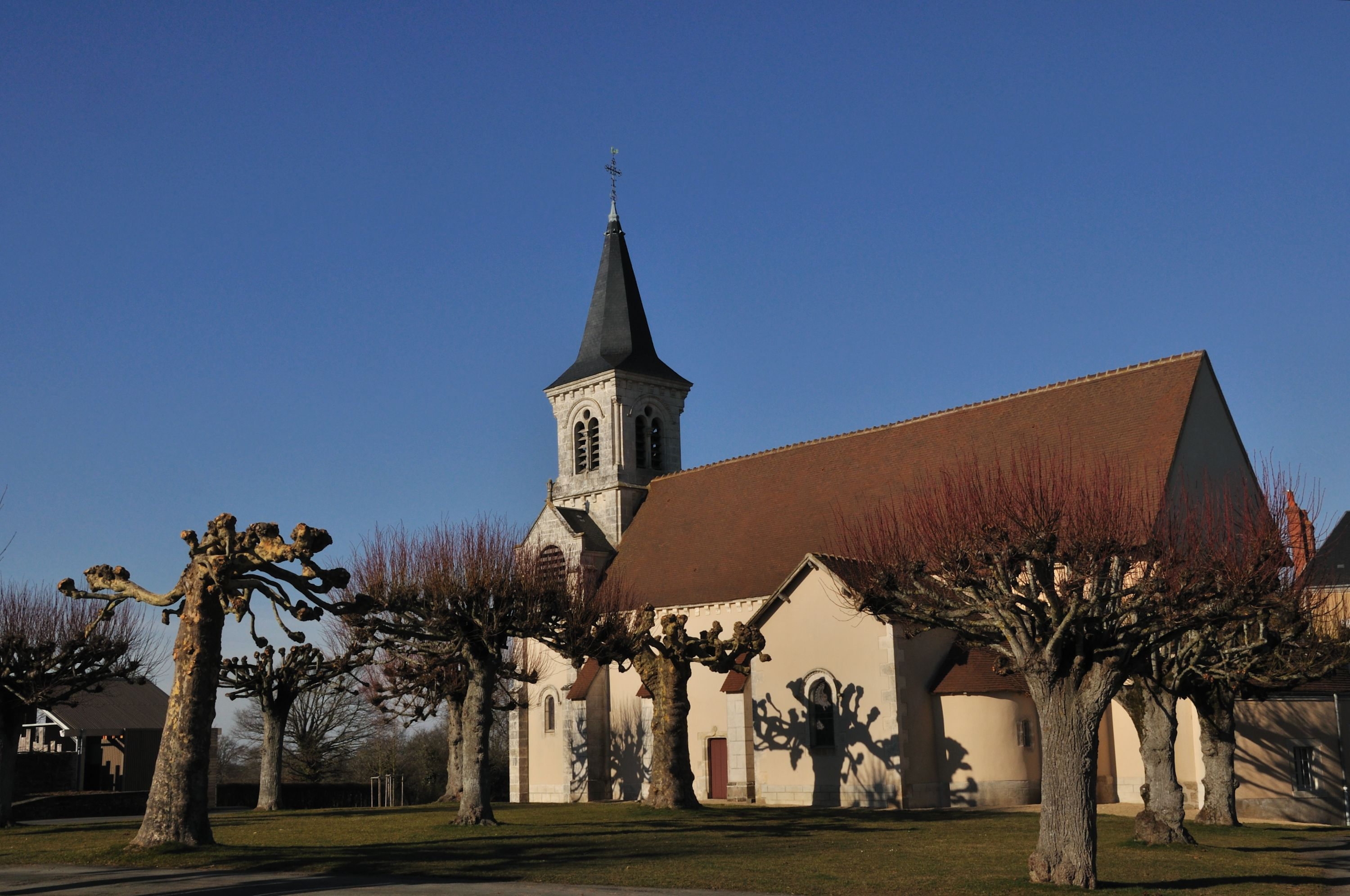 Fougerolles (Indre) - Eglise